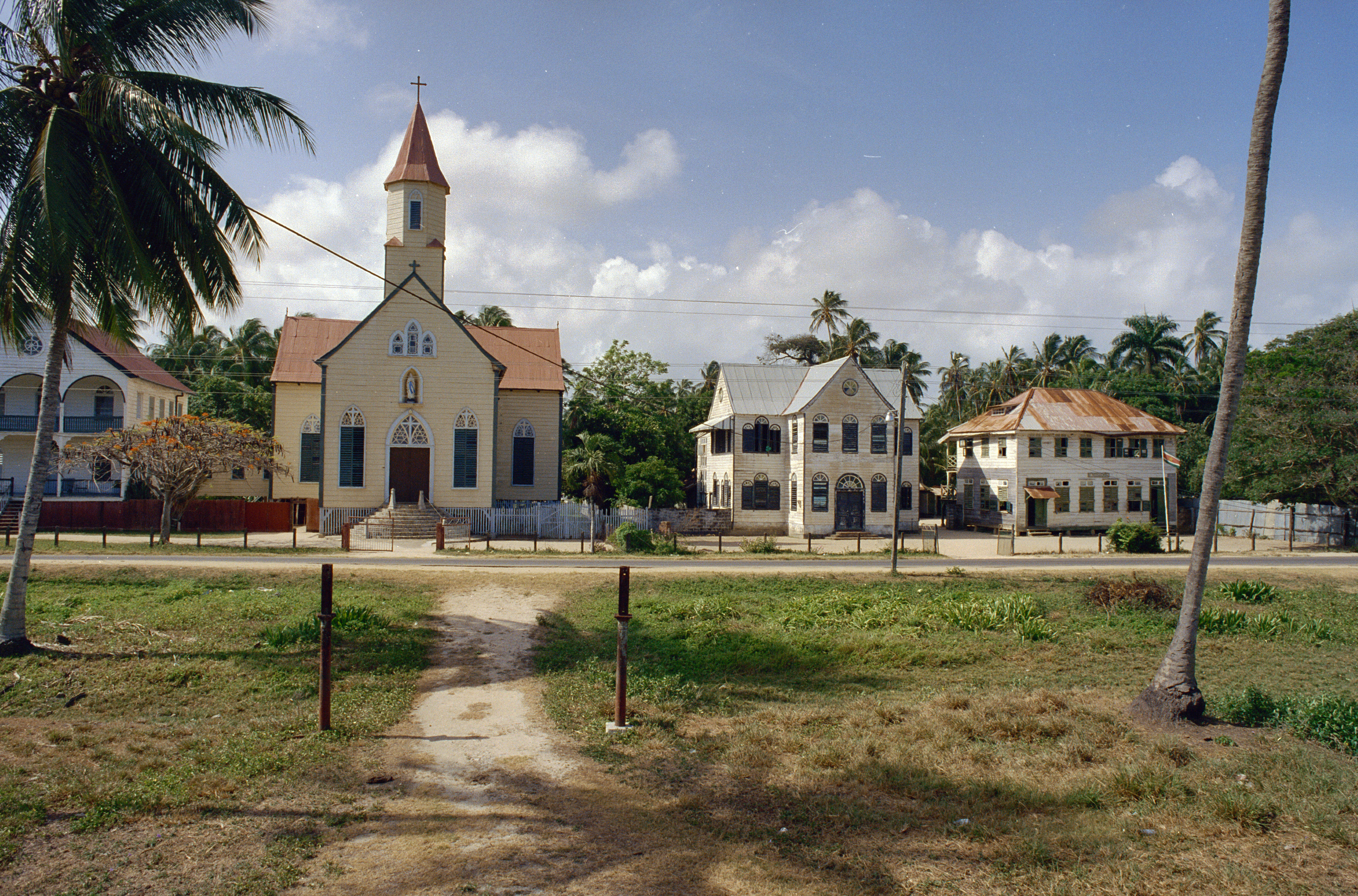 Koloniale geschiedenis/ Kerken: Vooraanzicht gevels met links een kerk (opmerking: Suriname Reis Loek Tangel)